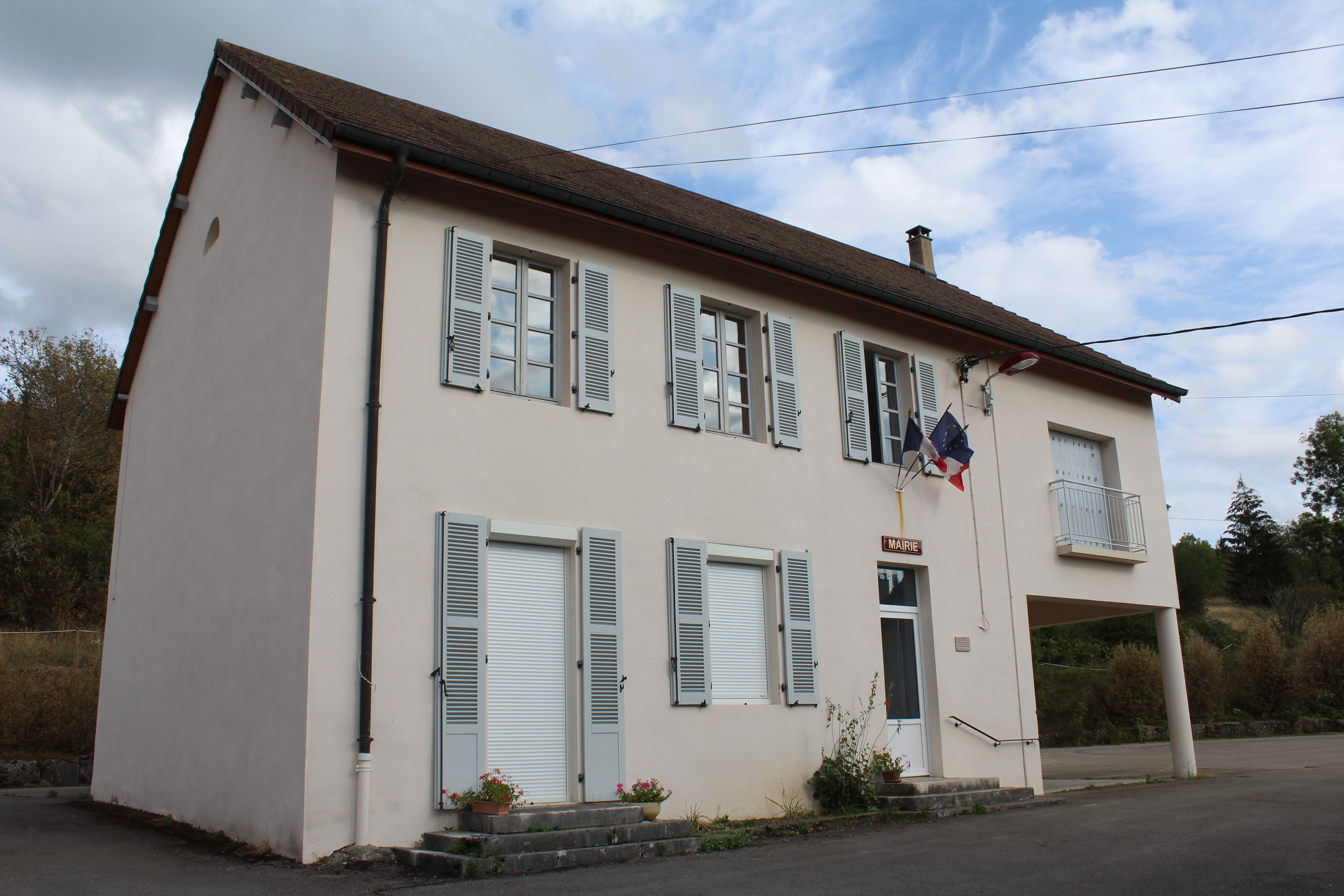 Mairie de Légna, Valzin-en-Petite-Montagne.